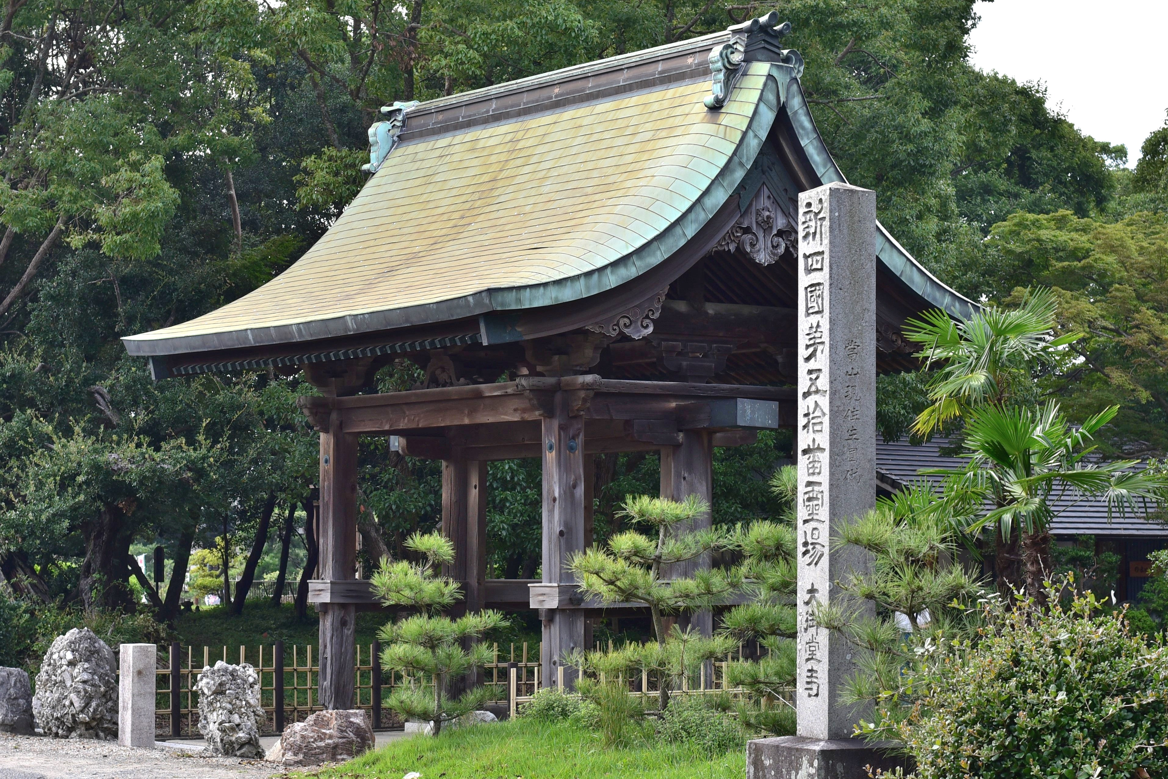 大御堂寺大門 Nikon D750